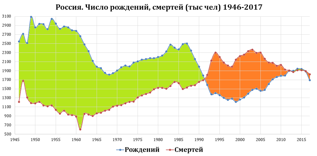 Россия. Число рождений, смертей (тыс чел) 1946-2017